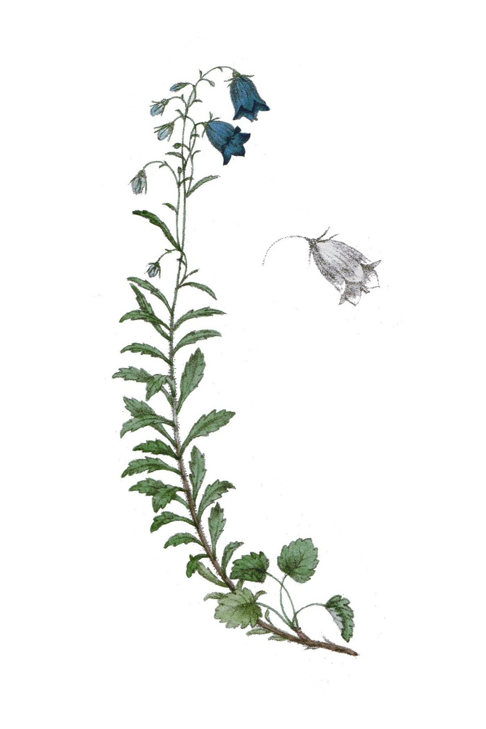 Dictionaire des plantes suisses 1853 Scanné par Utilisateur:Greatpatton